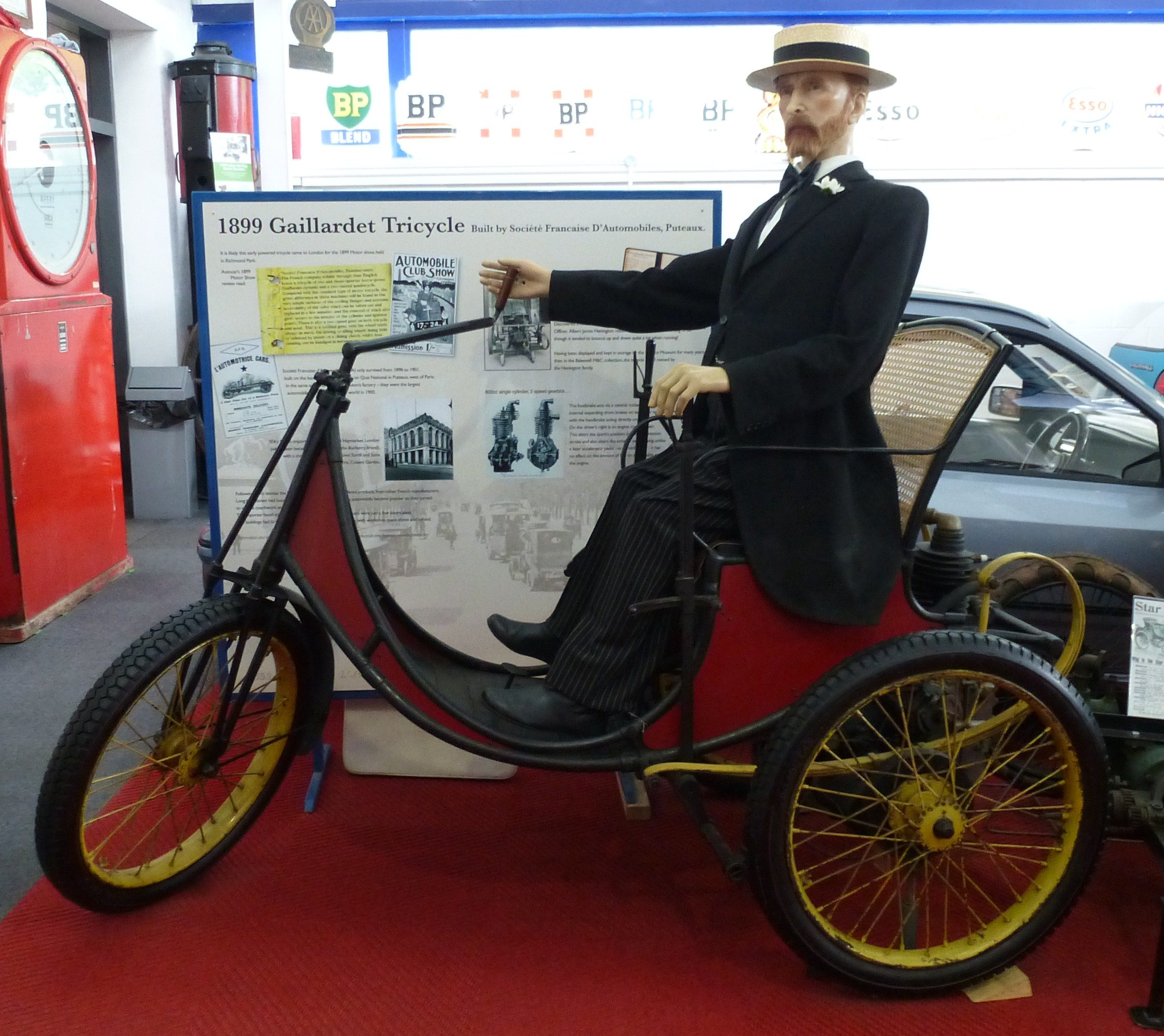 Gaillardet Tricycle 1899